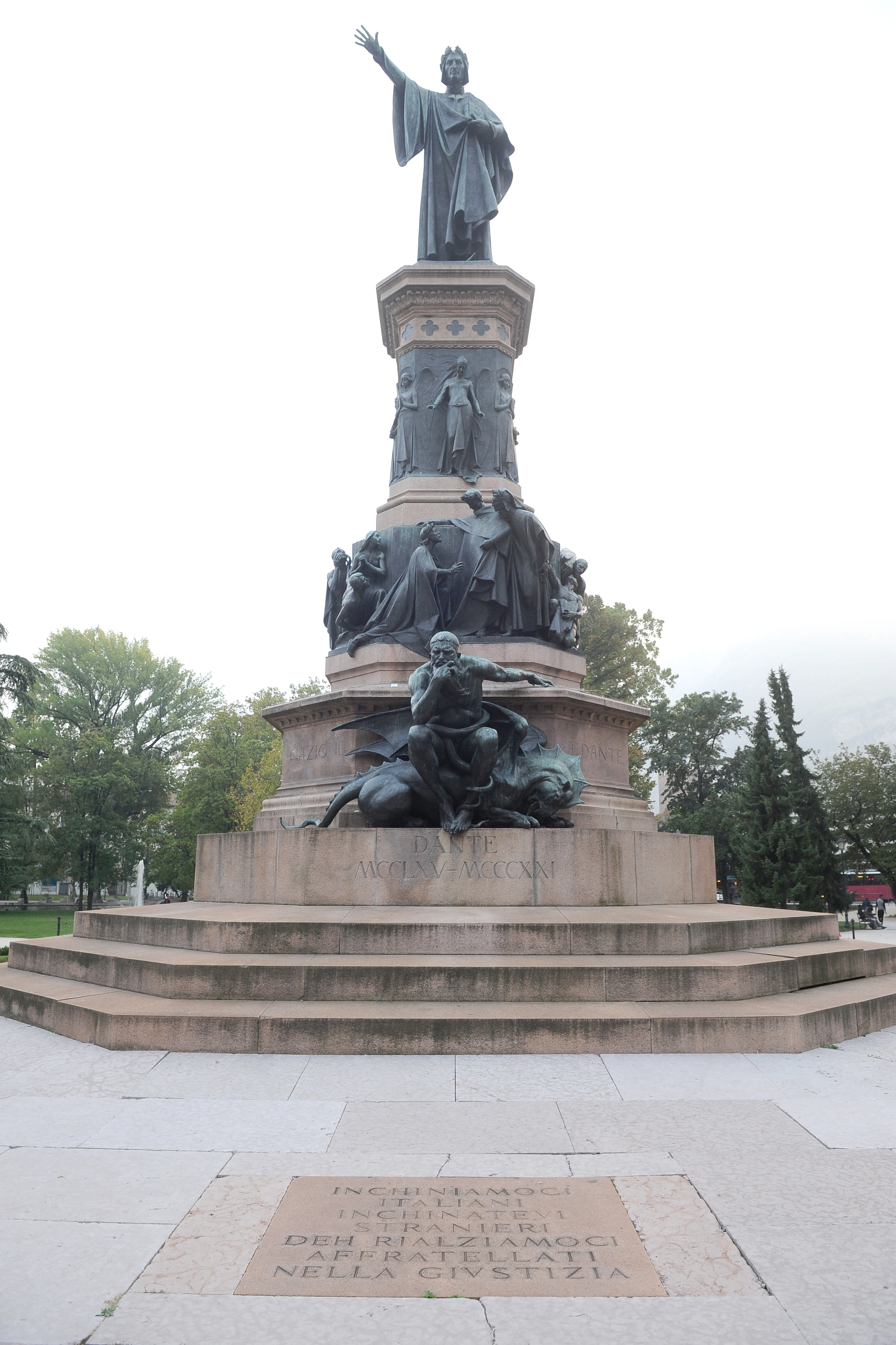 Monumento a Dante Alighieri This is a photo of a monument which is part of cultural heritage of Italy.